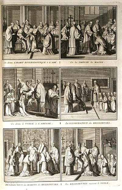 Illustration aus Cérémonies et coûtumes religieuses de tous les peuples représésentés par des figures dessinées par Bernard Picart, Amsterdam 1723-1743, von Jean Frédéric Bernard .